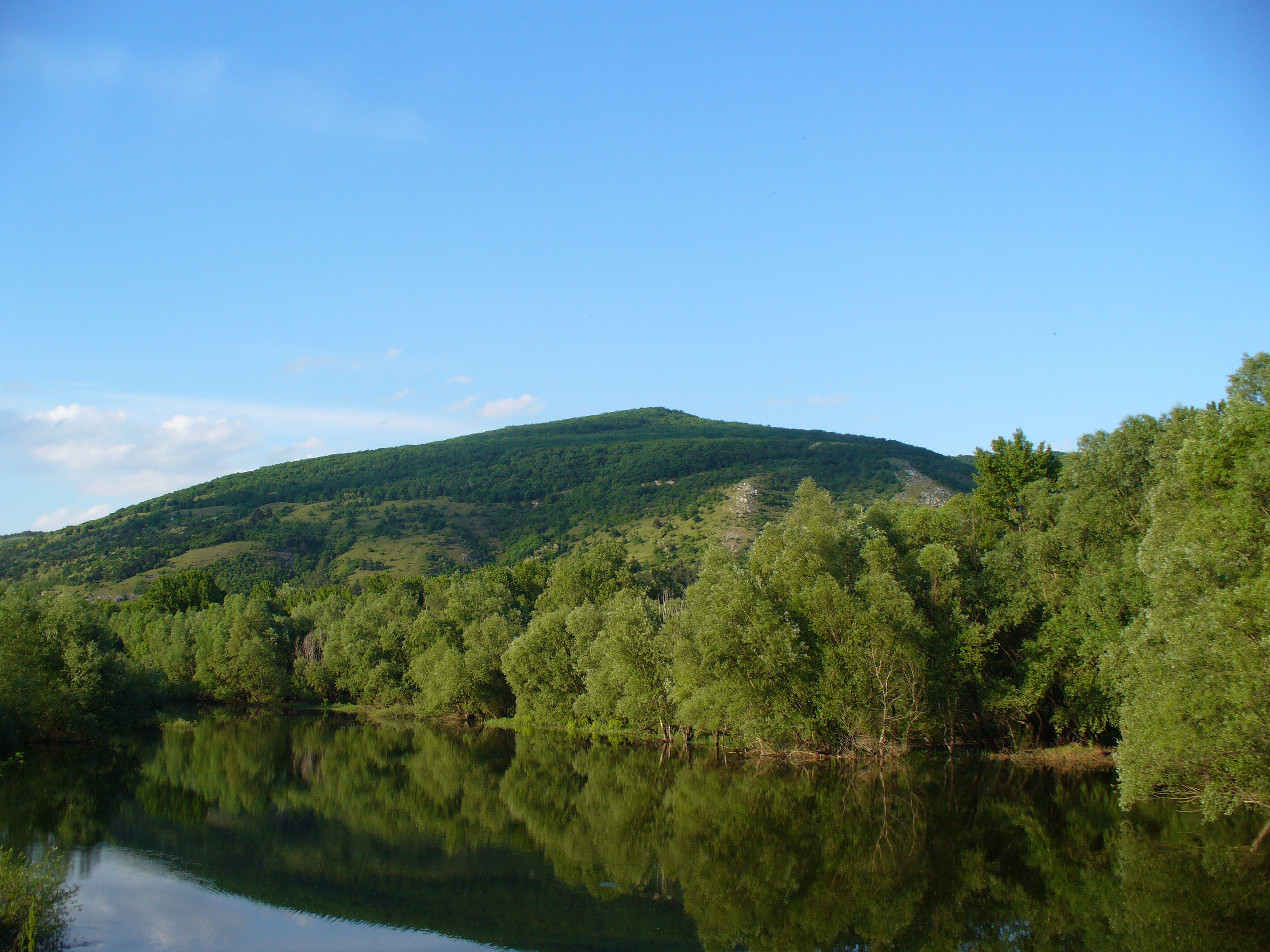 Devinska Kobyla, Bratislava, Slovakia - Bratislava's highest point at 514 m ASL